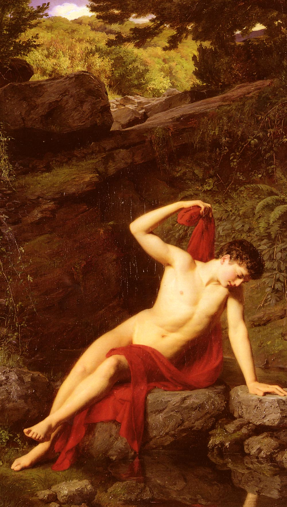 Narcisse d'Adolf Graß (1867).